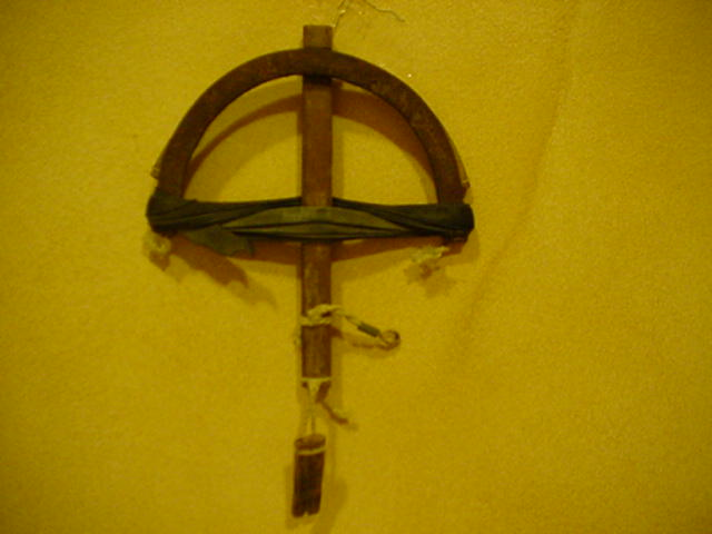 no problem